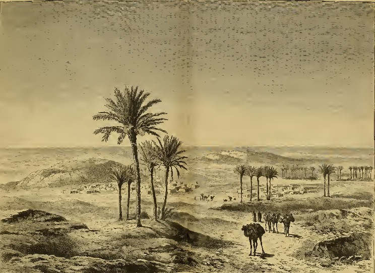 Illustration de l'Oasis de Tindouf en 1880